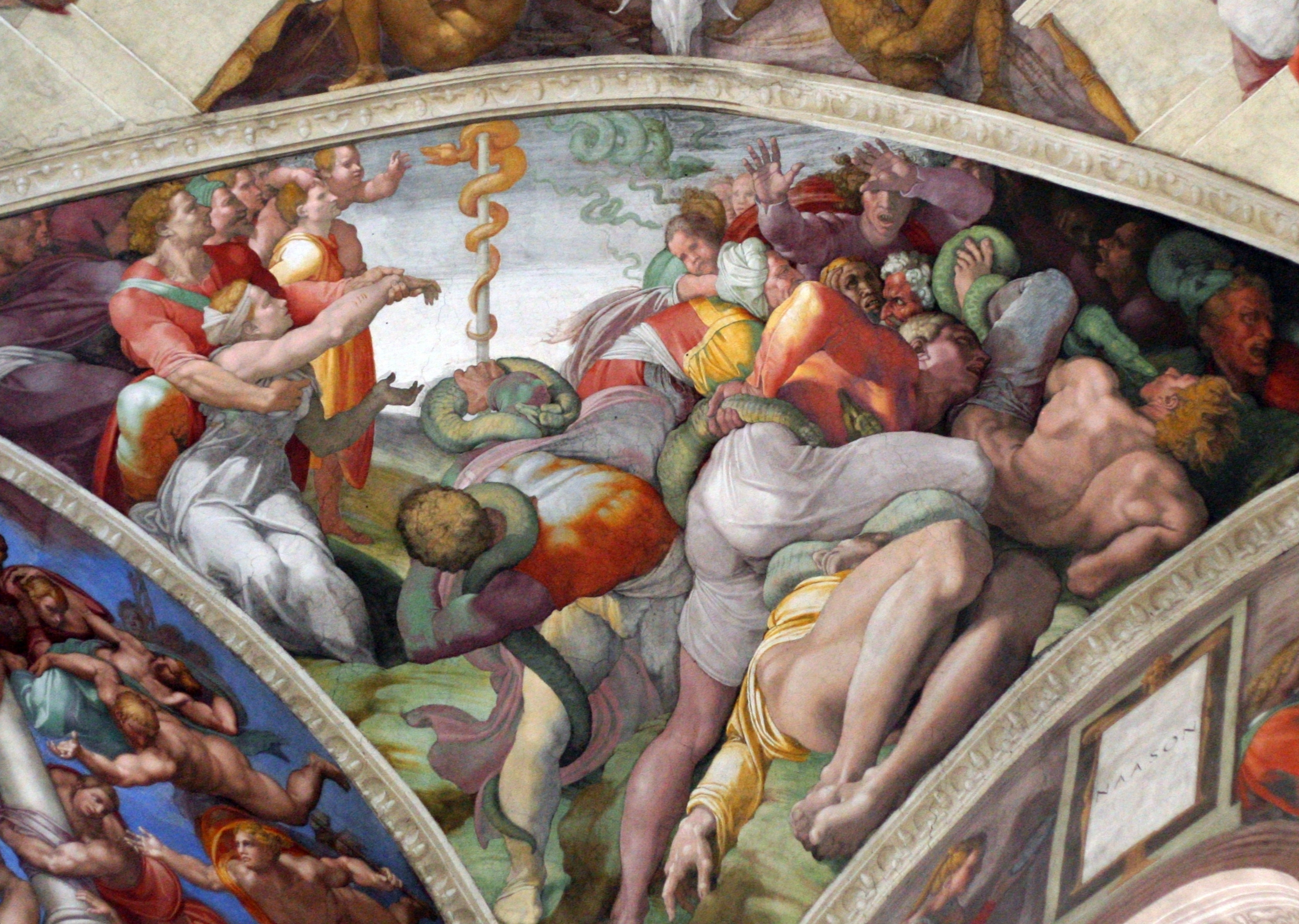 A megfeszített kígyó ábrázolása (Michelangelo?), a Sixtus-kápolna mennyezetfreskójának részletén, a Vatikánban.